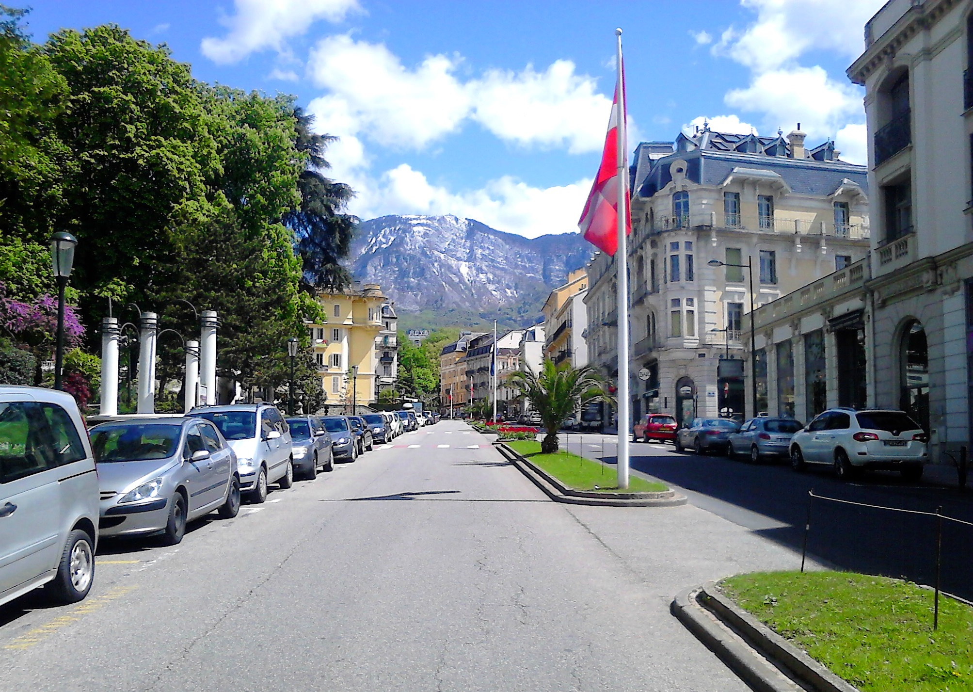 L'avenue Charles de Gaulle d'Aix-les-Bains dans le sens ouest-est dominée par le mont Revard.